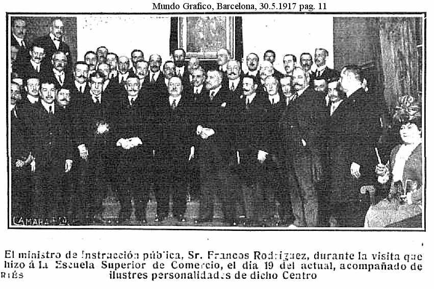 El ministro de Istruccion publica, Sr. Francos Rodriguez, durante la visita que hizo a la Escuela Superior de Comercio, el dia 19 del actual, acompanado de ilustres personalidades de dicho Centro.